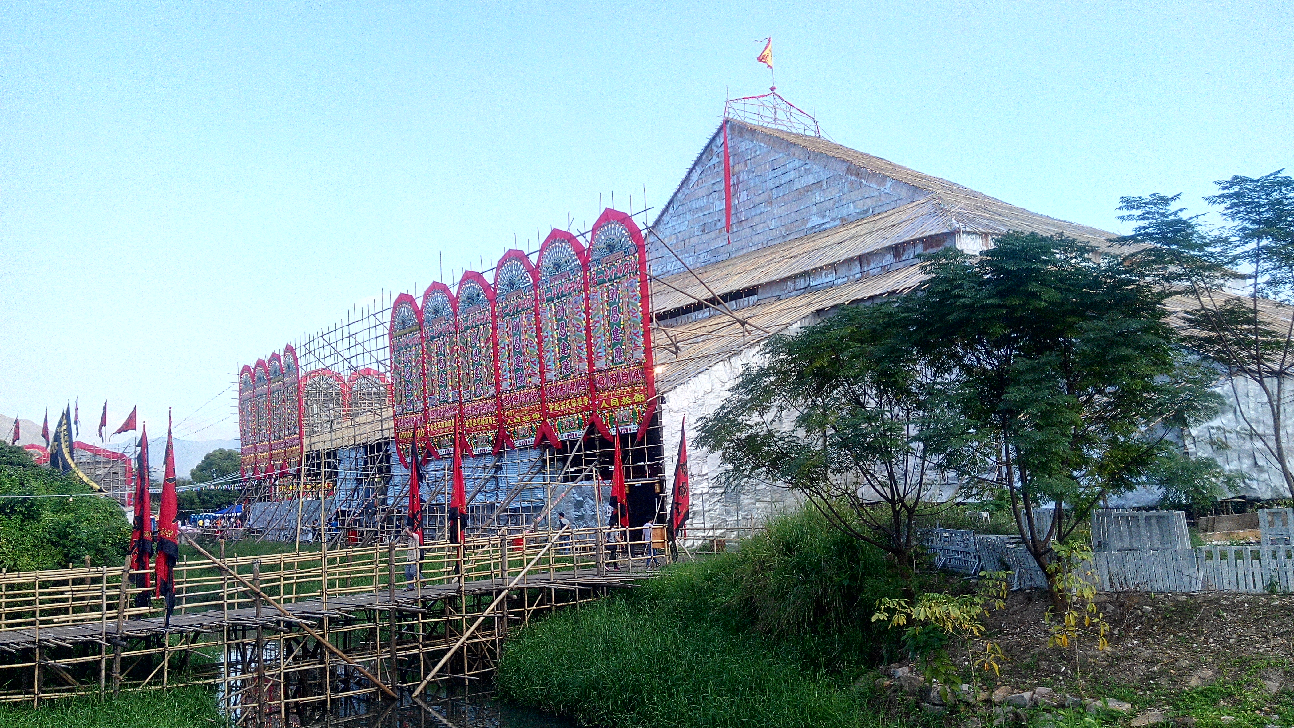 中文（香港）: 錦田十年一屆（第33屆，乙未年）酬恩建醮大戲棚